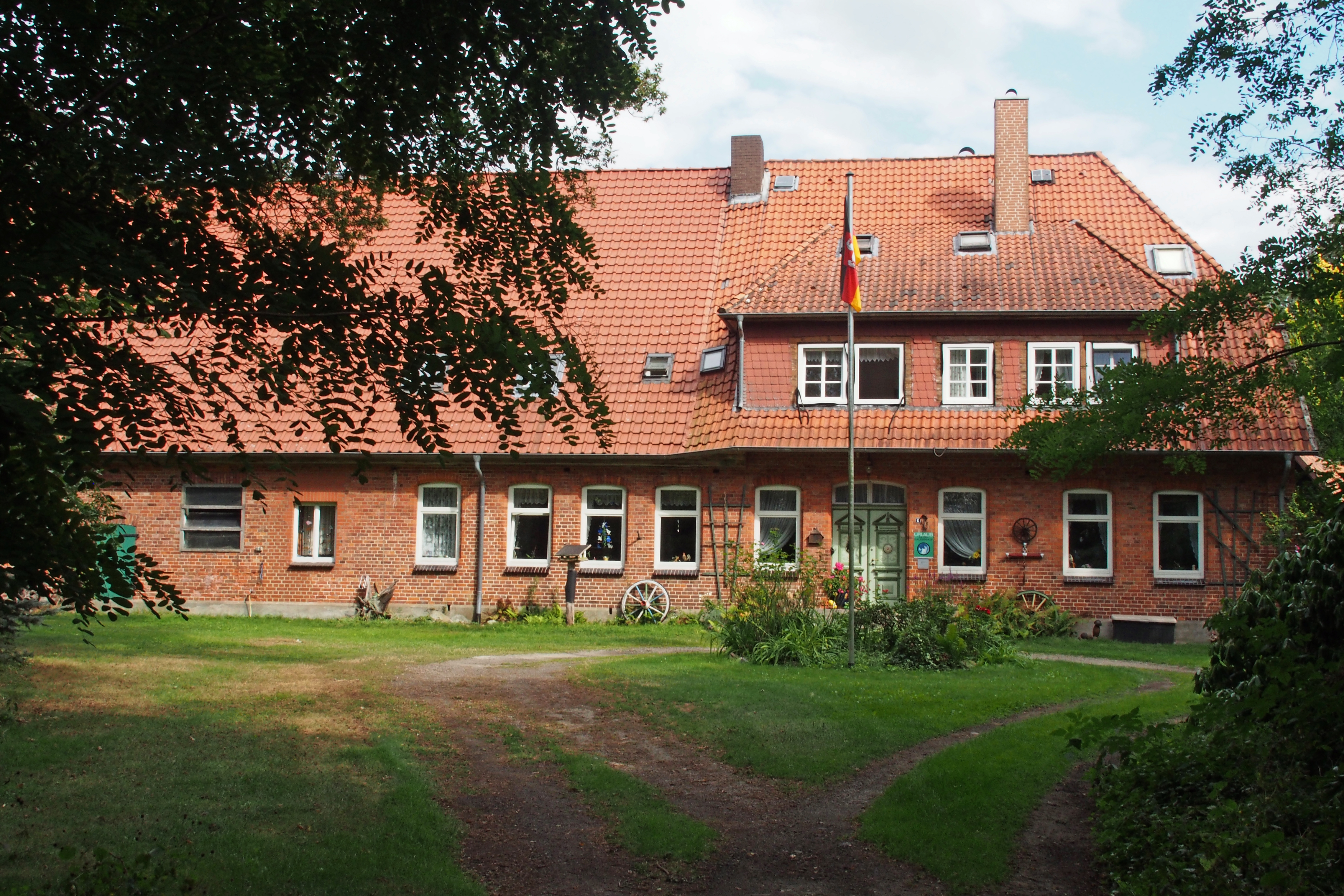 Bauernhof in Poitzen, Gemeinde Faßberg